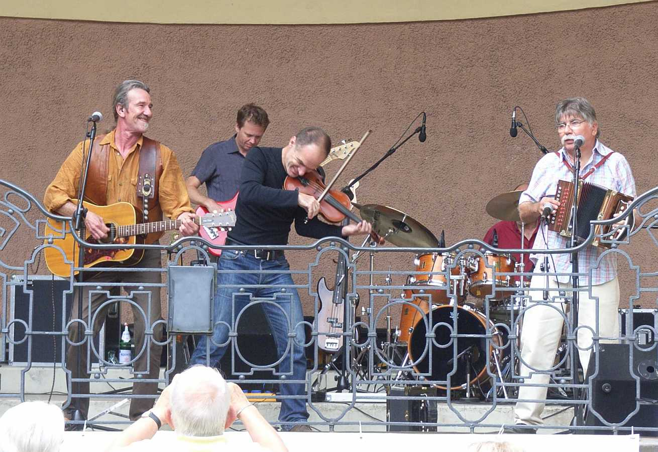 Open Air Auftritt der Cajun Band Le Clou in Mönchengladbach 2007